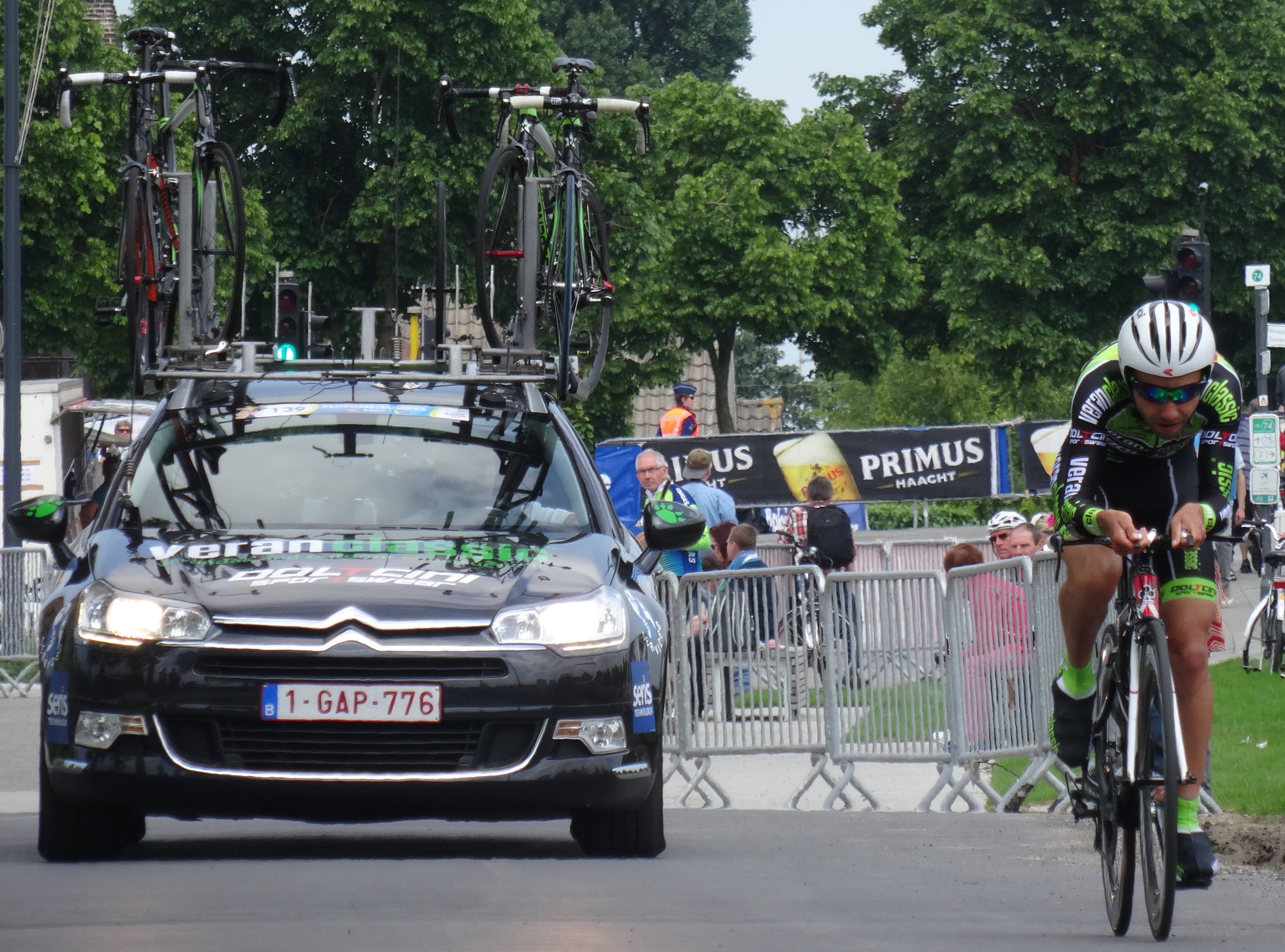 Reportage photographique réalisé le vendredi 30 mai à l'occasion du contre-la-montre individuel de la troisième étape du Tour de Belgique 2014 à Dixmude, Belgique.